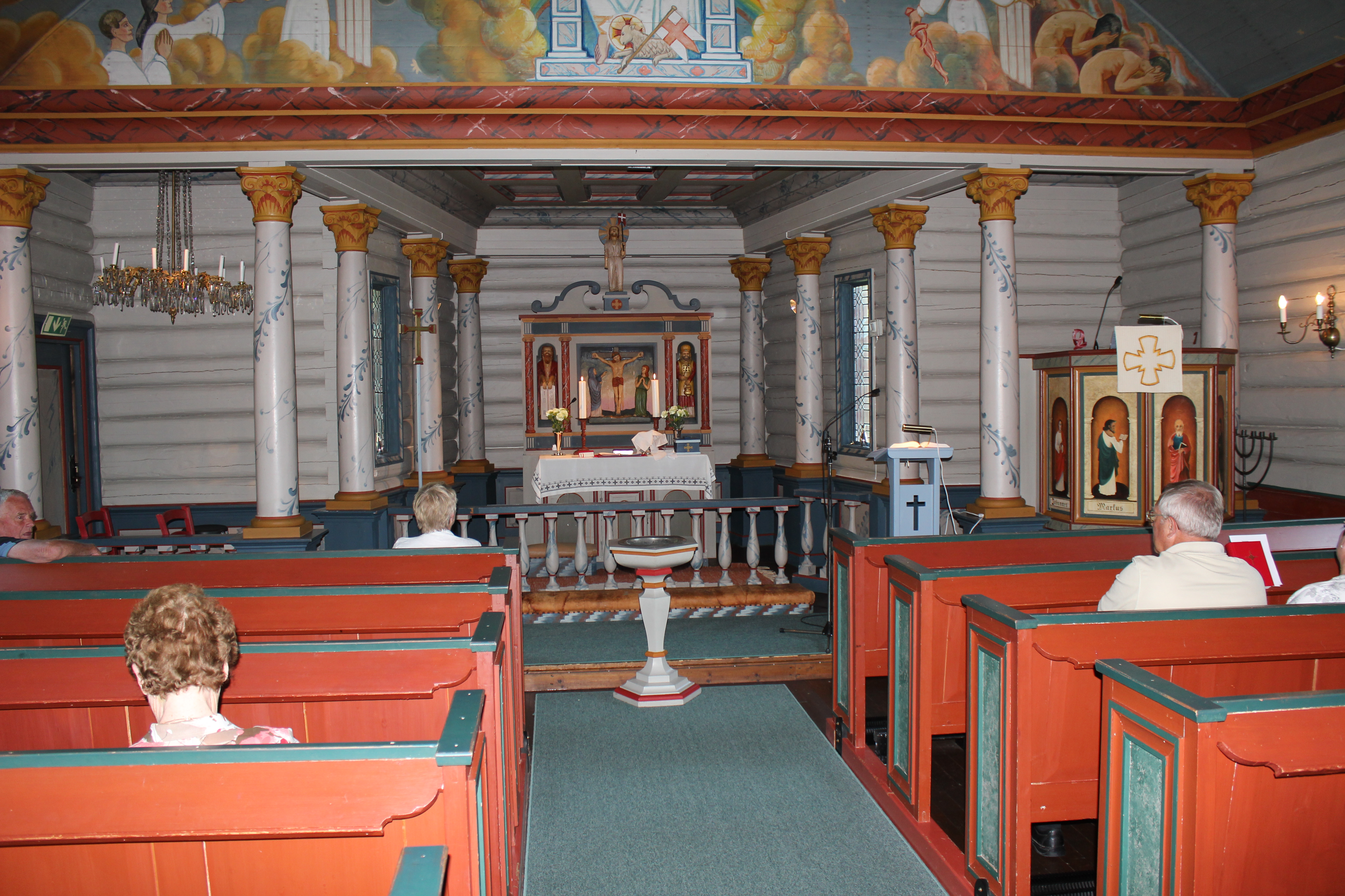 Interiør Skrukkelia Kapell